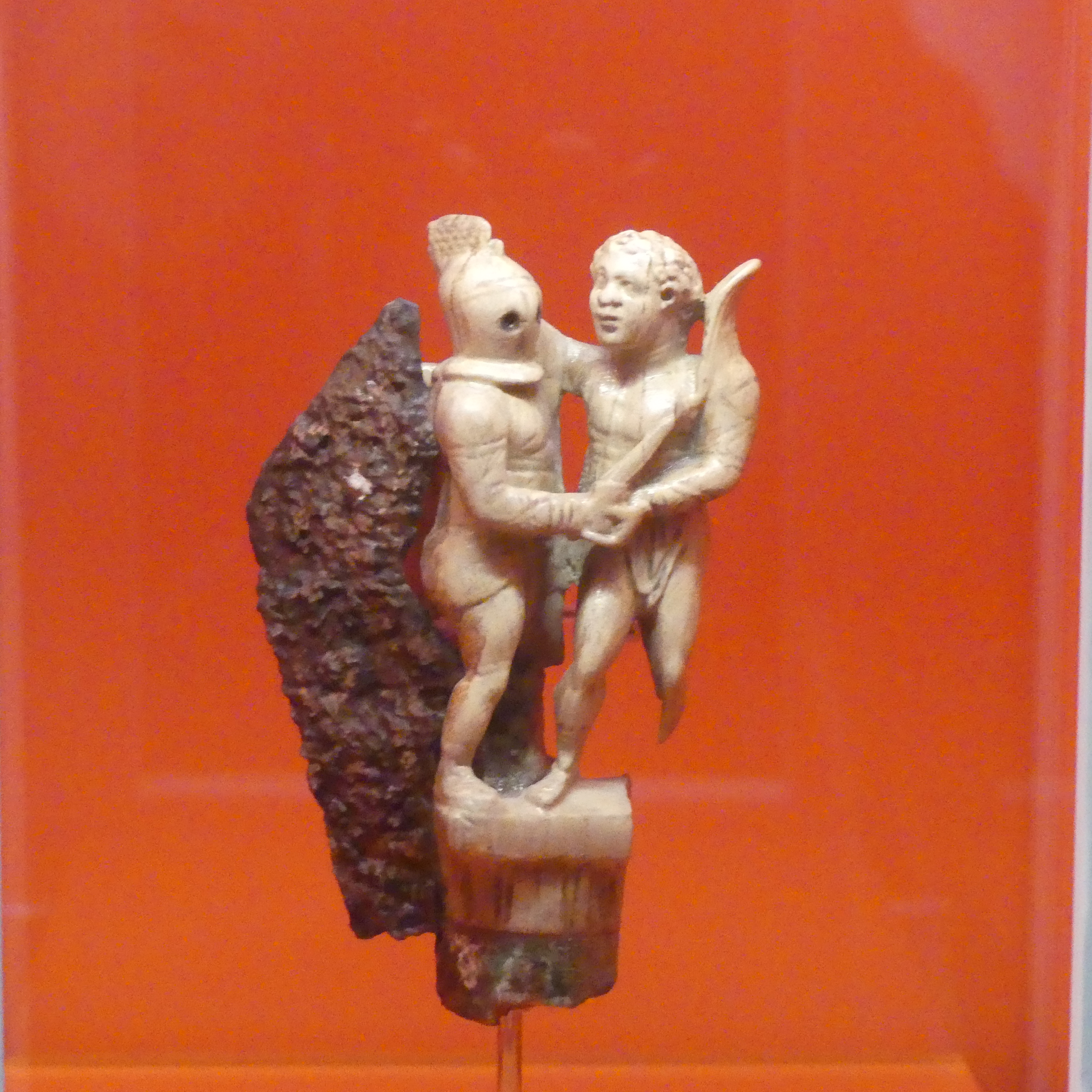 Couteau pliable avec manche en ivoire représentant deux gladiateurs s'affrontant : un retiaire avec un filet et un secutor avec casque et épée.